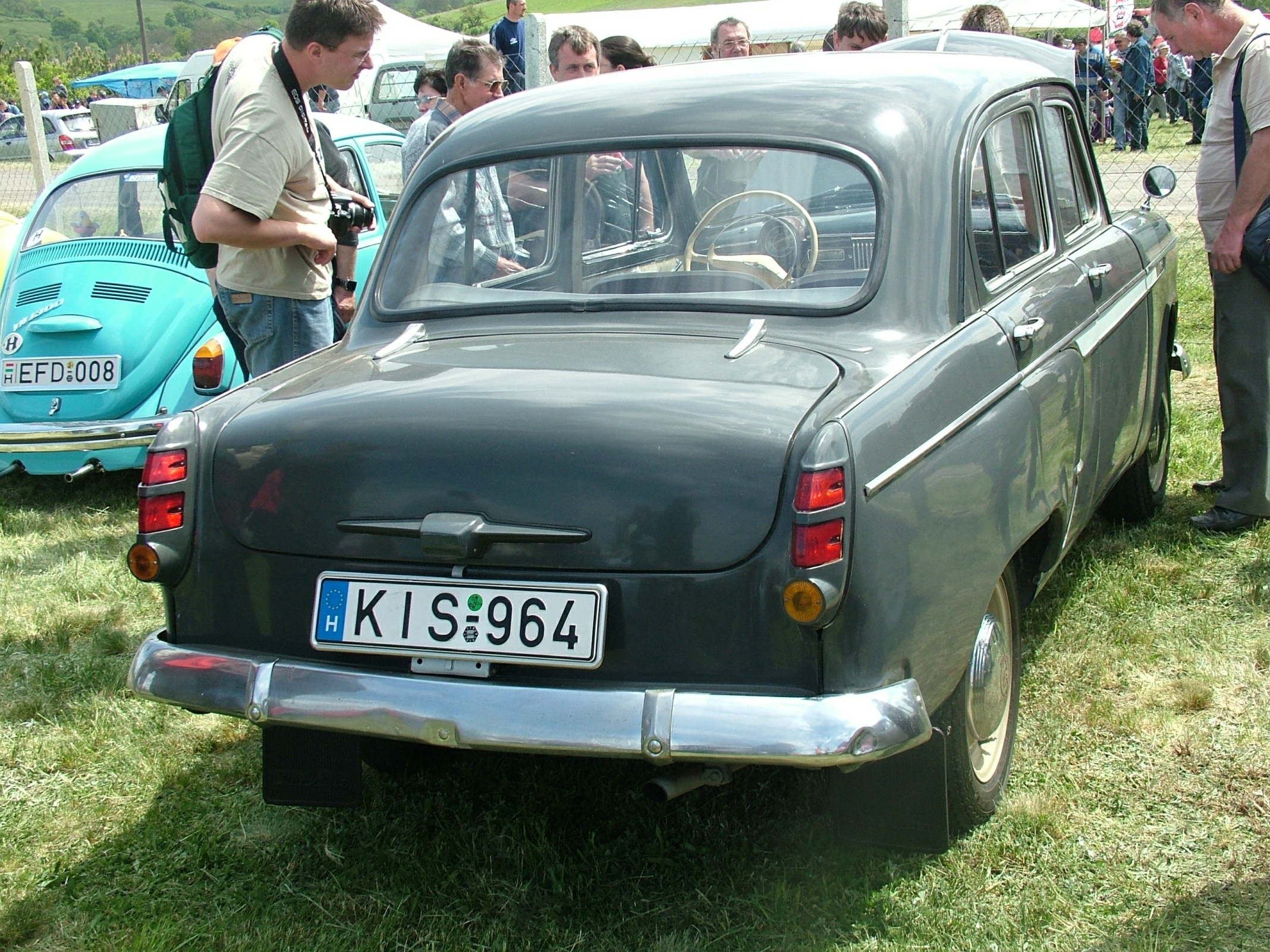 Moskvich 403IE